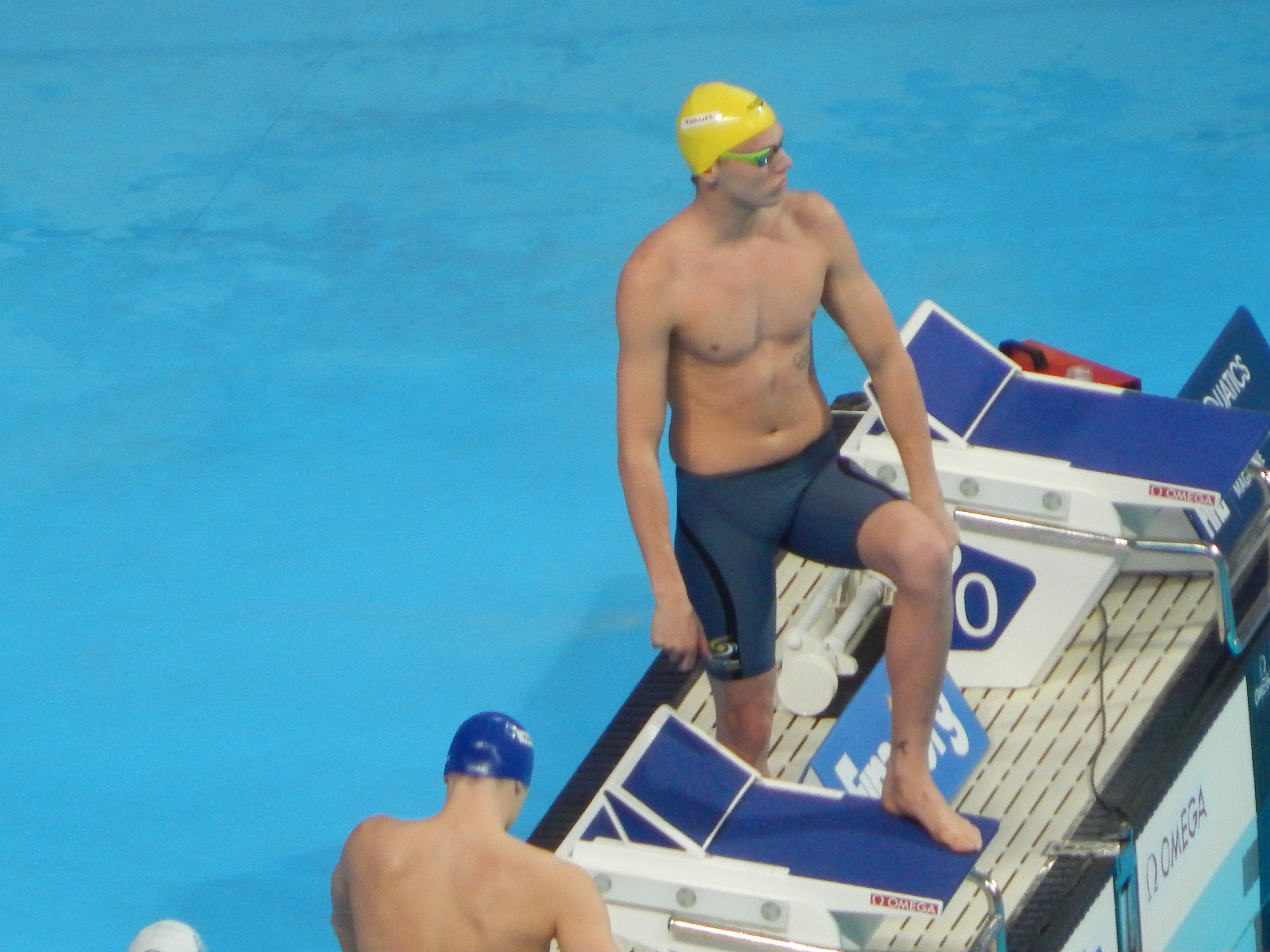 Томас Фрейзер Холмс в Казани 200 метров комплекс